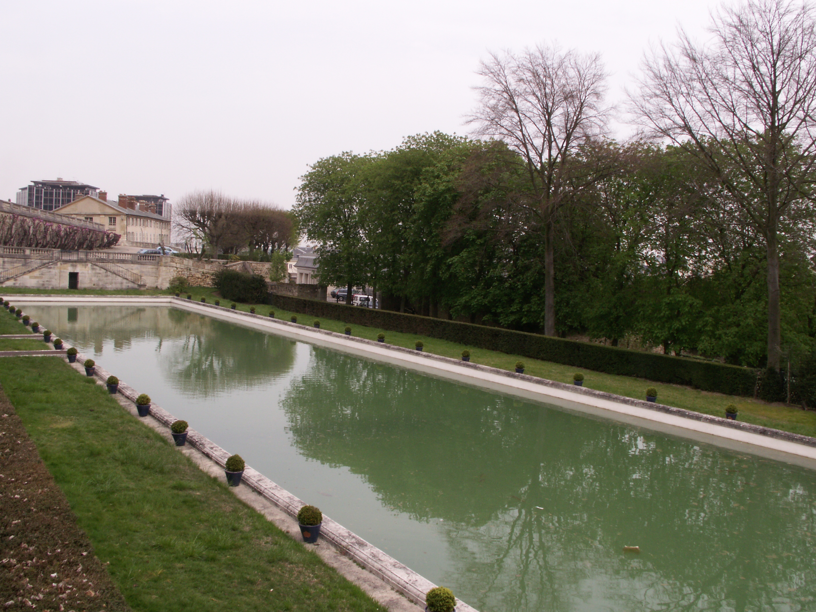 Parc de Saint Cloud